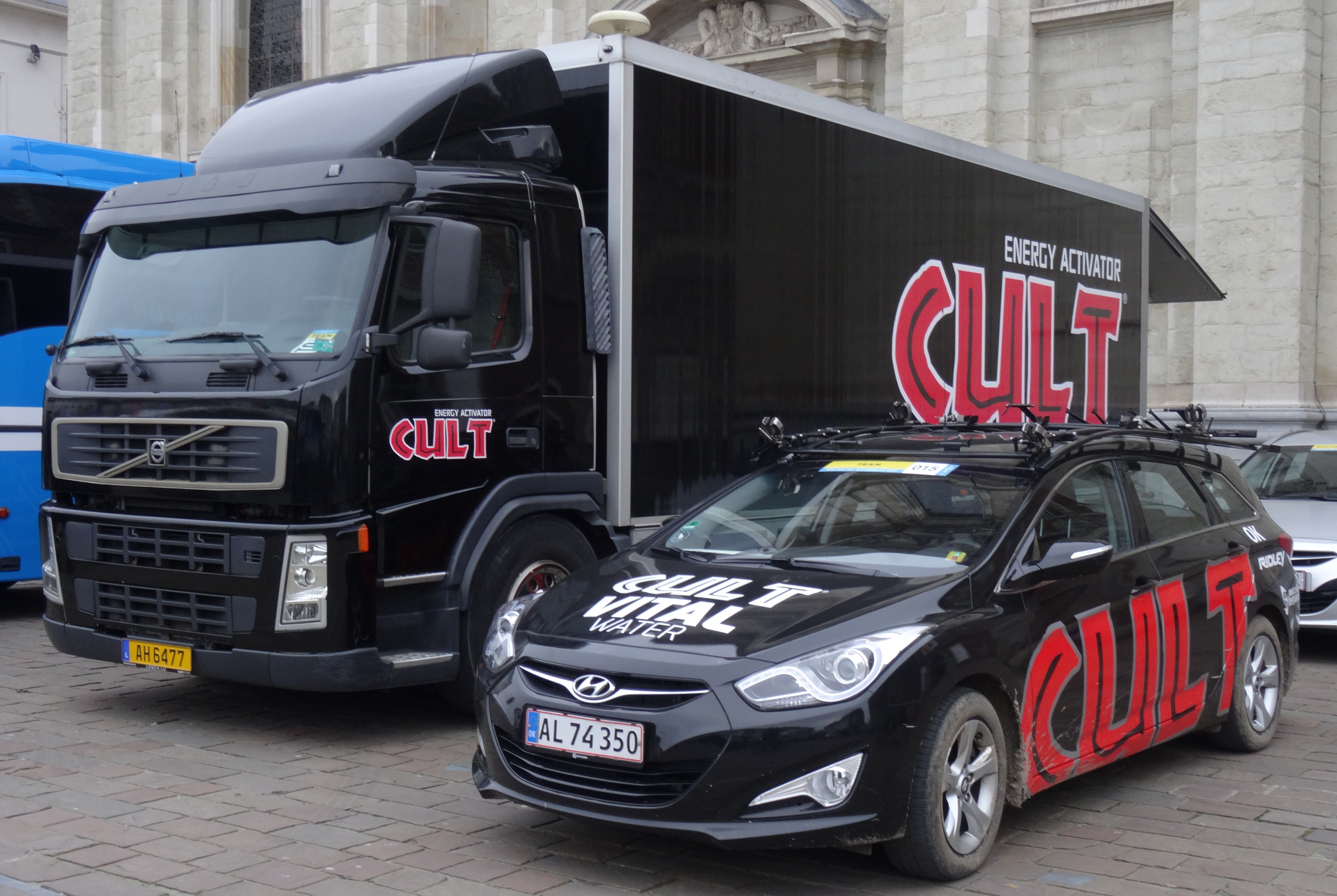 Reportage réalisé le samedi 28 février à l'occasion du départ et de l'arrivée du Circuit Het Nieuwsblad 2015 à Gand, Belgique.